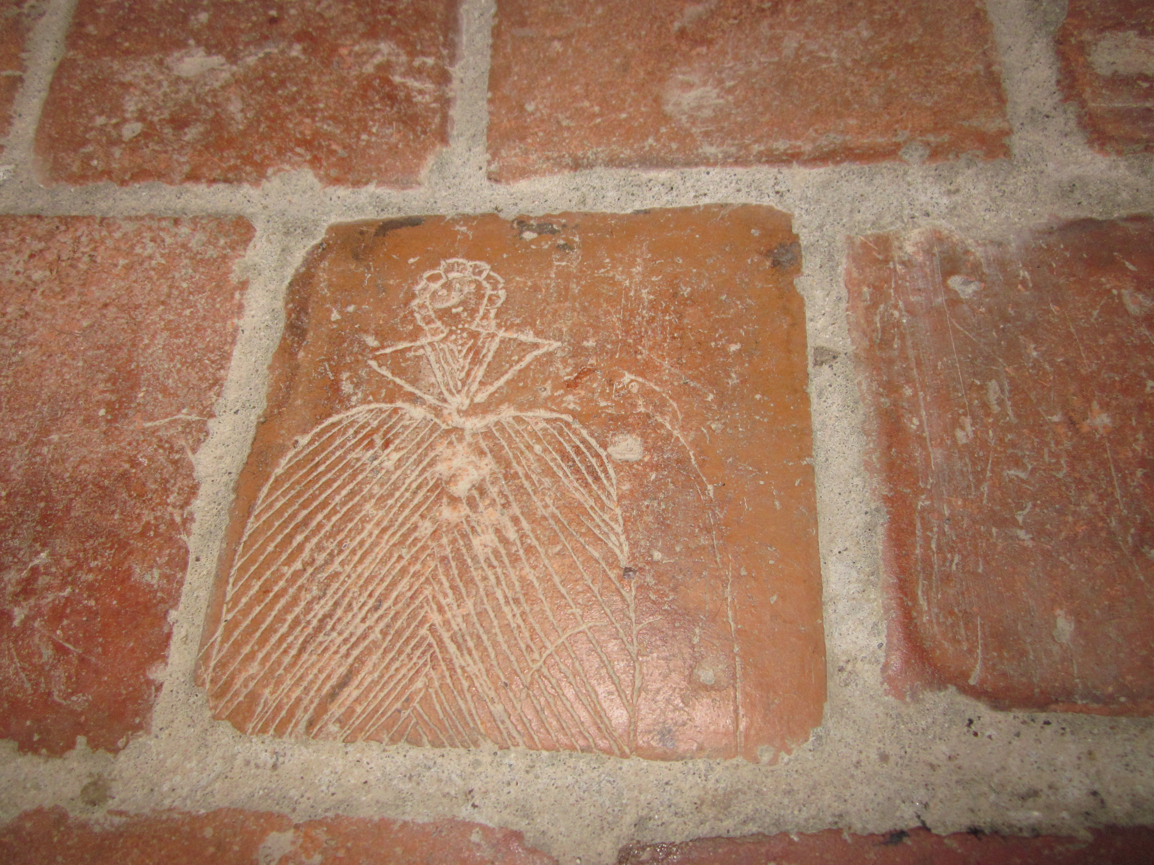 Abbaye d'Acey : pavement de sol de l'église abbatiale portant un dessin de femme